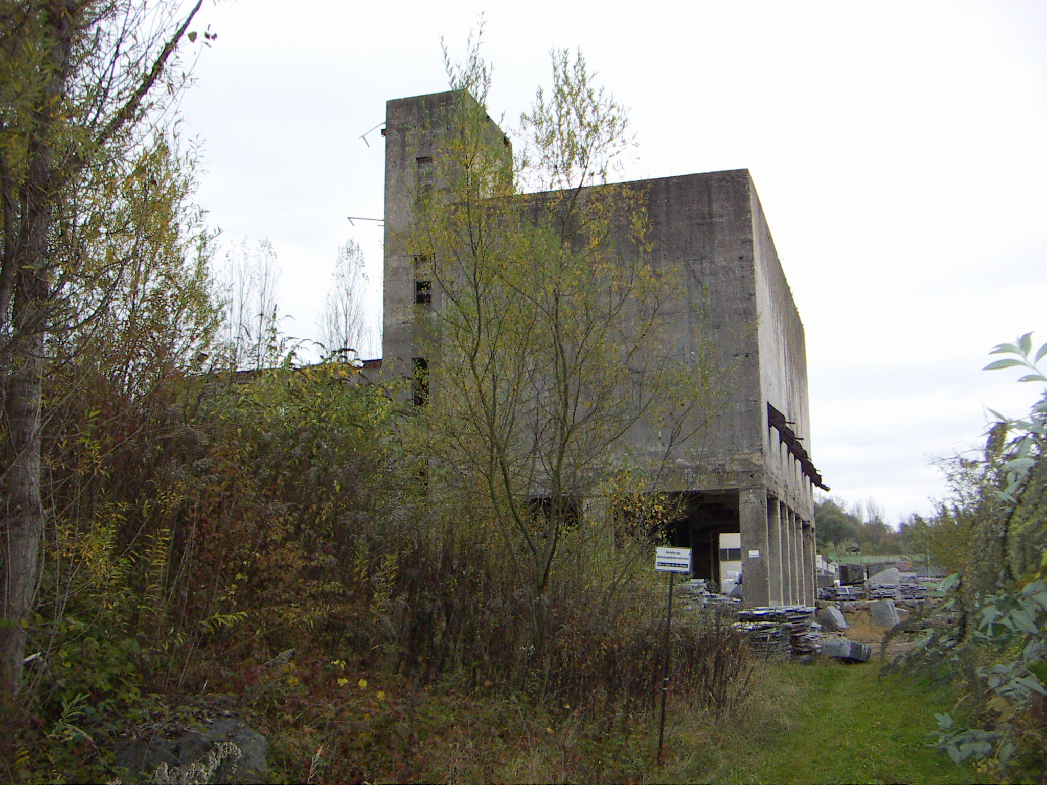 Groß-Schotteranlage (Steinbrecher) des ehemaligen KZ Gusen I. Diese Groß-Schotteranlage beim Steinbruch Gusen-Kastenhof wurde von KZ-Häftlingen des KL Gusen I im Zeitraum zwischen Oktober 1941 und März 1943 für die DEST-Werkgruppe St. Georgen errichtet, um Kleinmaterial, das bei der Produktion von Werksteinen aus Granit abfiel, in großen Mengen zu kriegswichtigem Gleisschotter zu verarbeiten. Diese Groß-Schotteranlage war damals die größte derartige Anlage in ganz Europa und war über eine eigene Anschlussahn (der sog. "Schleppbahn") über den Bahnhof St. Georgen/Gusen mit dem Streckennetz der Deutschen Reichsbahn verbunden. Eisenbahnwaggons konnten zur raschen Befüllung nebeneinander auf zwei parallel durch diese Anlage hindurchführenden Geleisen gleichzeitig befüllt werden.